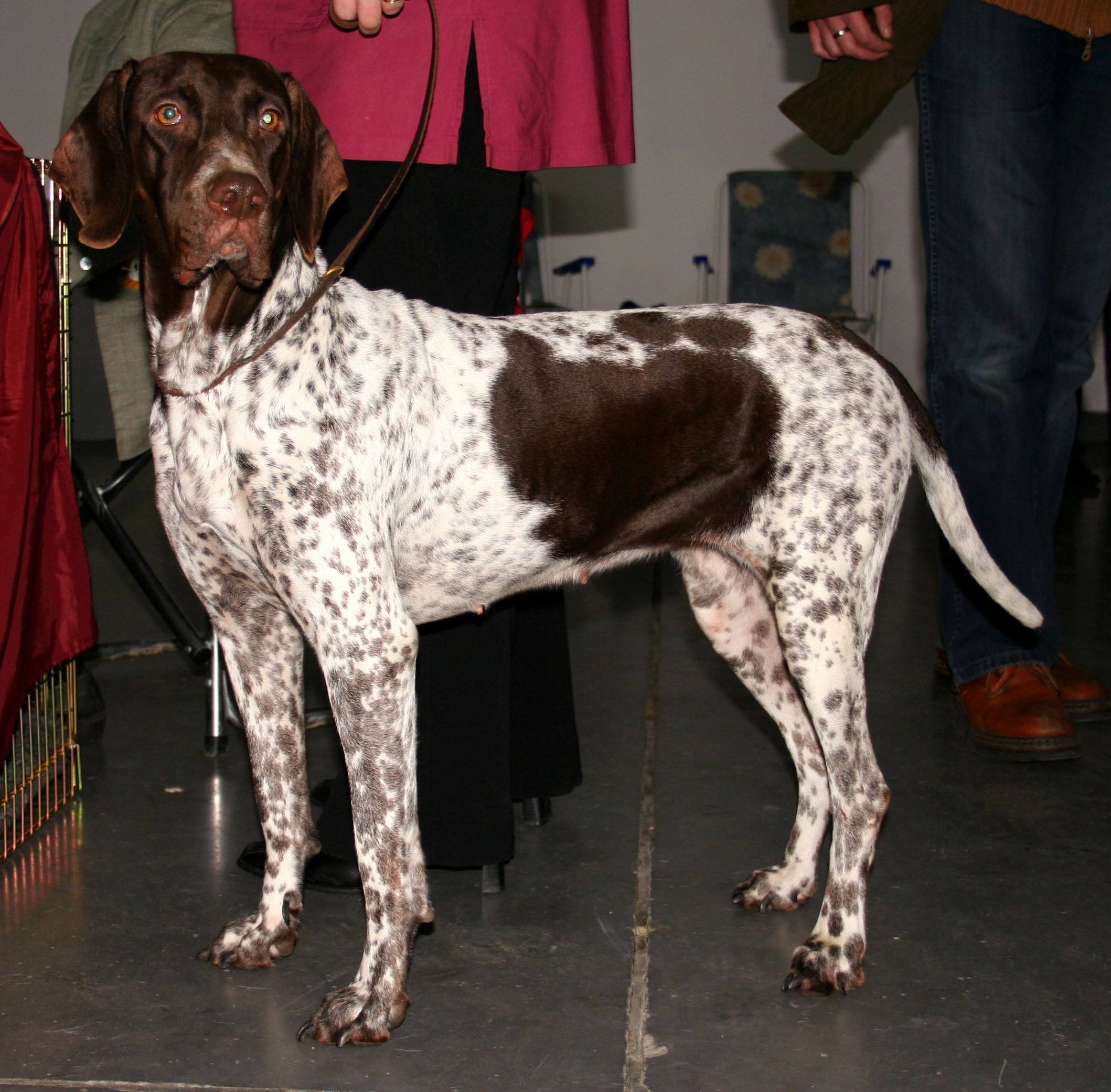 Wyżeł_duński na Światowej Wystawie Psów Rasowych w Poznaniu